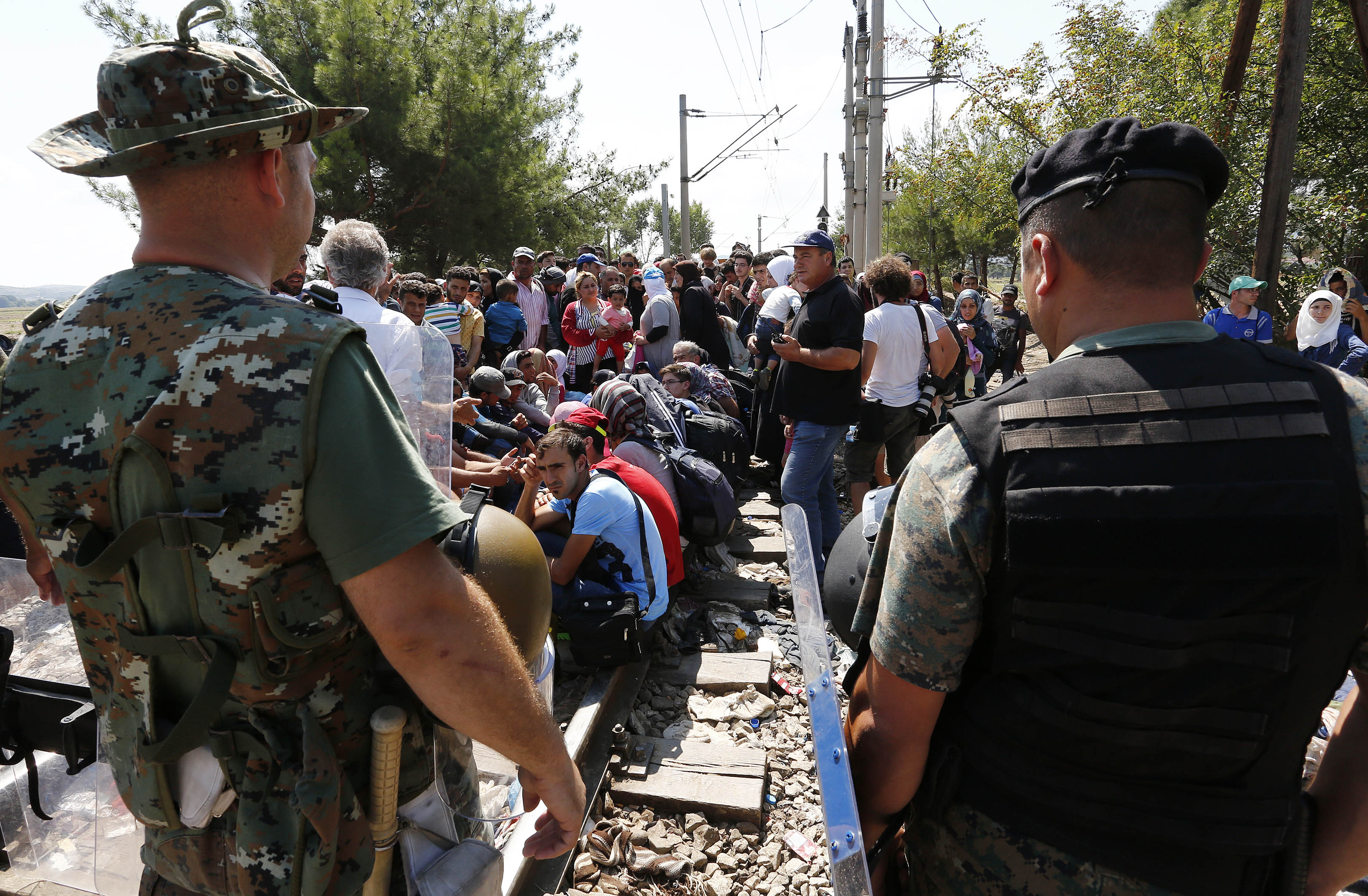 Arbeitsbesuch von Bundesminister Sebastian Kurz in Mazedonien. Besuch der Flüchtlingsströme am Grenzübergang Gevgelija. Mazedonien, 24.08.2015, Foto: Dragan Tatic